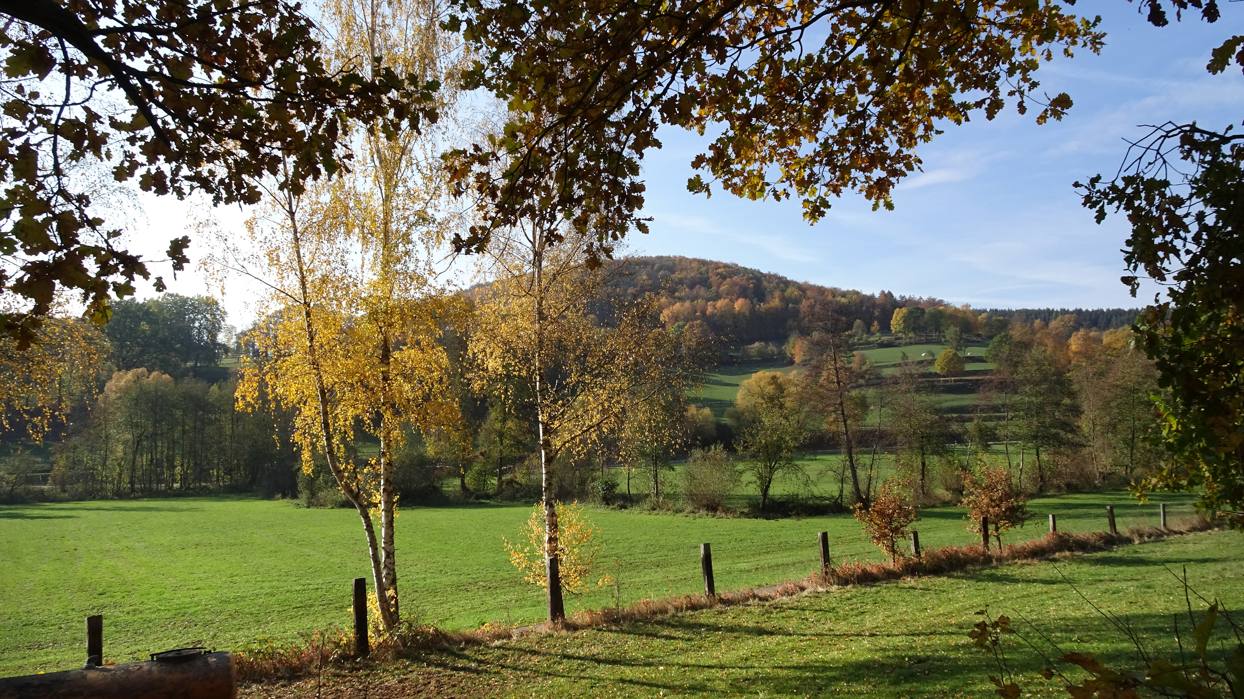 Der Trimberg bei Reichensachsen ist eine Bergkuppe im nordhessischen Werra-Meißner-Kreis, die sich mit einer Höhe von 332,6 m westlich und nördlich des Tals der Wehre erhebt. Die Vegetation besteht aus artenreichen Buchenwäldern, die in großen Teilen aus einer ehemaligen Niederwaldbewirtschaftung hervorgegangen sind. Um die im Gebiet des Trimberges lebenden seltenen Tierarten und die hier vorkommenden gefährdeten Pflanzenarten einschließlich ihrer Lebensräume und Standorte zu schützen wurde der Bereich im Dezember 1993 zum Naturschutzgebiet erklärt und später an die EU-Kommission als Flora-Fauna-Habitat-Gebiet für das länderübergreifende Schutzgebietssystems Natura 2000 gemeldet. Das Schutzgebiet liegt westlich des Ortsteils Reichensachsen und nördlich des Ortsteils Oetmannshausen der Gemeinde Wehretal.